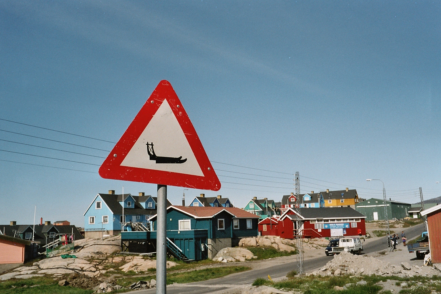 Schlittenwarnung